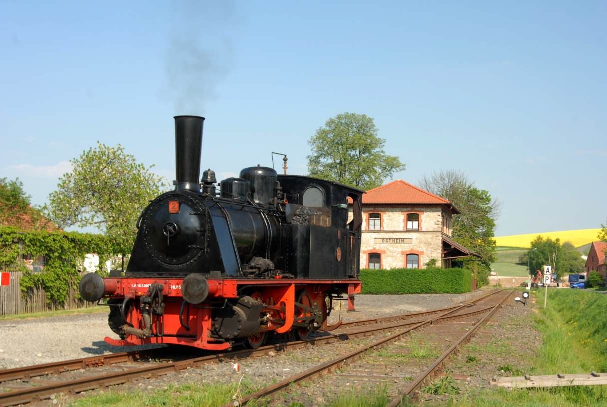 Ostheim Rhön, Bahnhof/ Ostheim Rhön (Bavaria) Railway Station